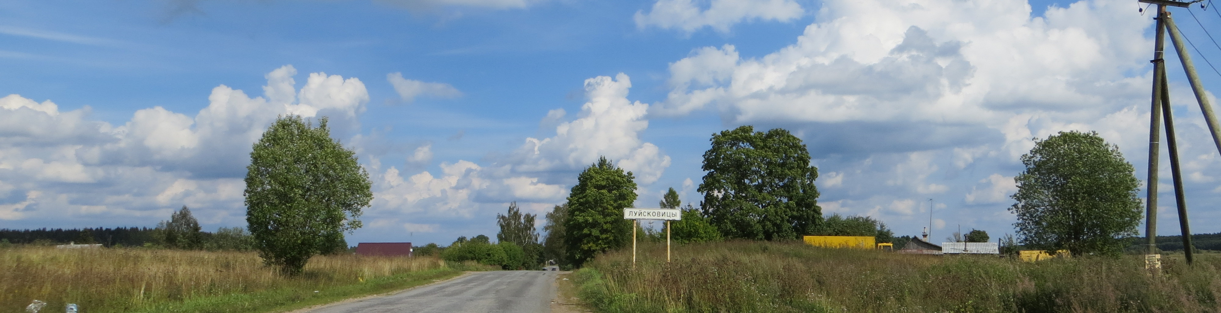 Деревня Луйсковицы.